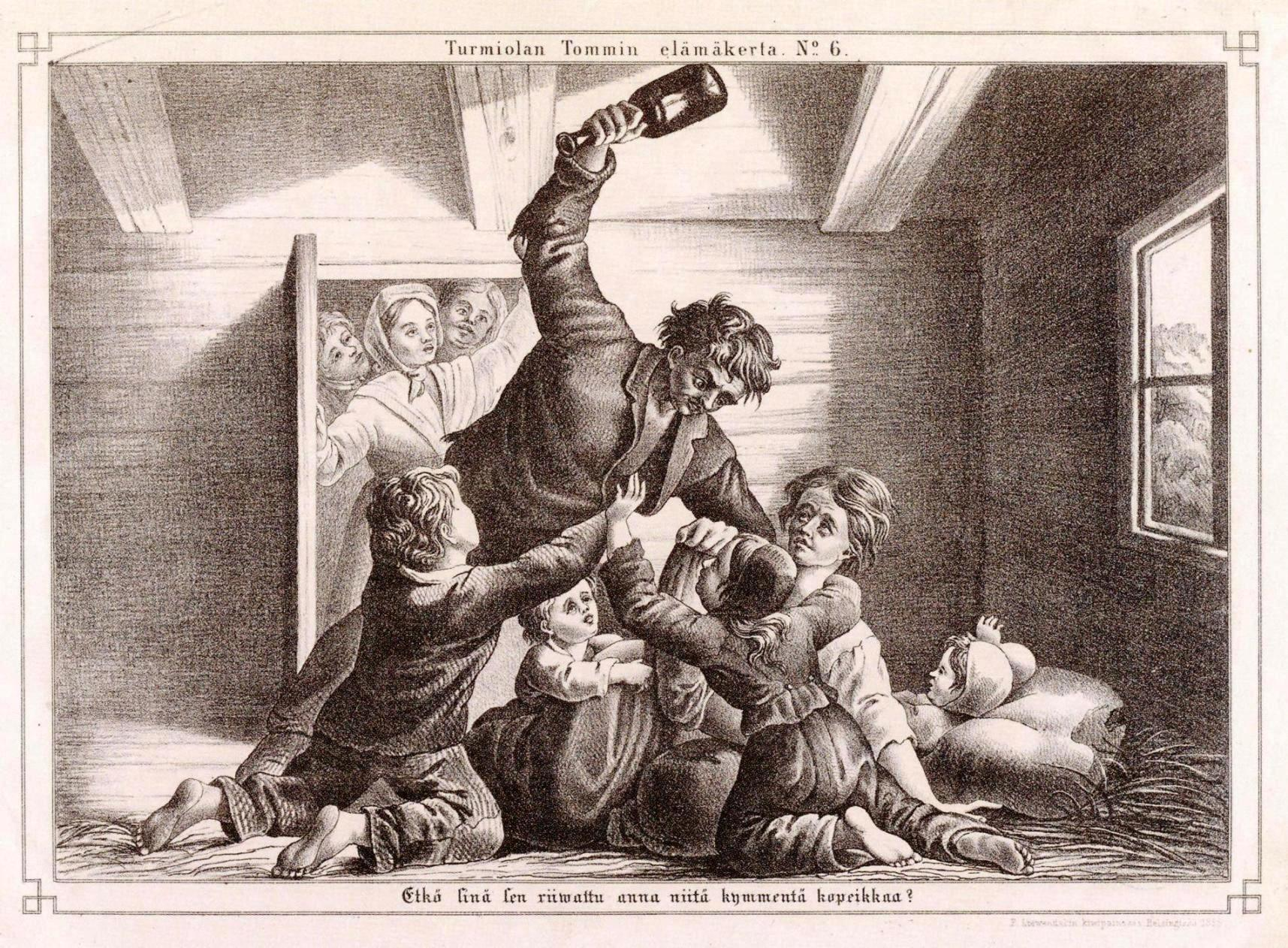 Kuva nro 6 Alexandra Frosterus-Såltinin kuvittamasta Turmiolan Tommi -kuvakirjasta. "Etkö sinä sen riiwattu anna niitä kymmentä kopeikkaa?"